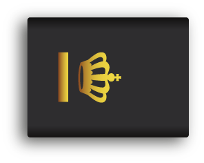 Rangen van de Nederlandse politie, epauletten (schuifpassanten) t.b.v. het huidige en het nieuwe (na 2014) uniform.